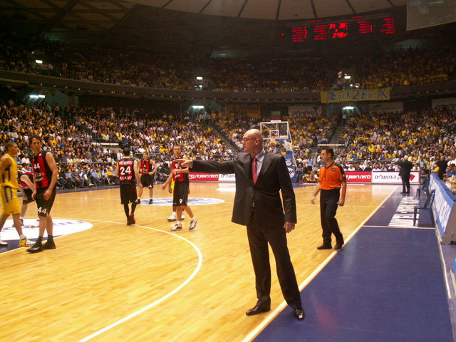 נבן ספאחיה, המשחק של ריטאס וילנה נגד מכבי ת"א ב - 2005/6